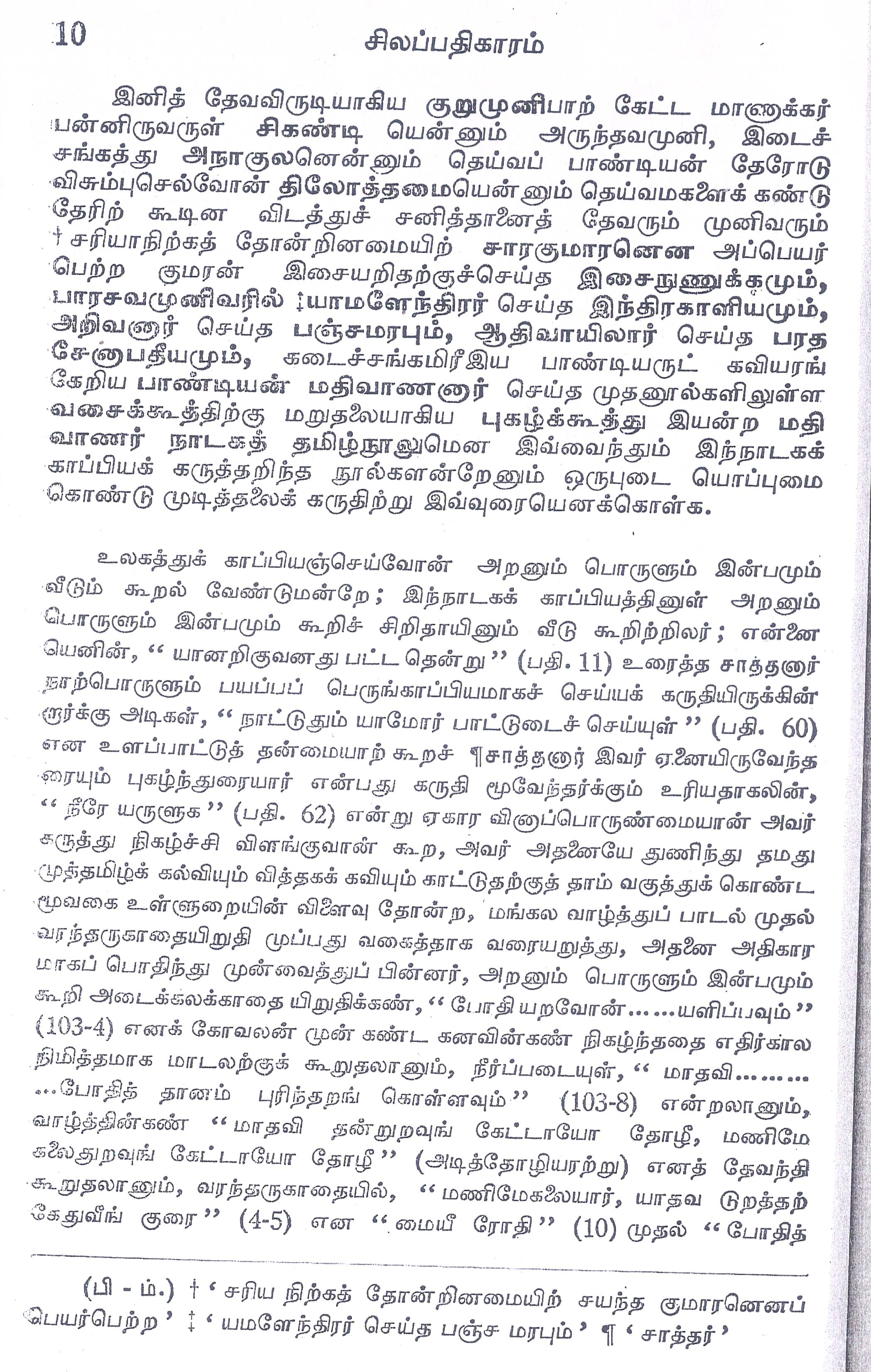 Source materials on three Ancient Tamil Academies by a commentator of 12th century A.D. (Book published in 1950) சிலப்பதிகாரம் சிறப்புப்பாயிரம் அடியார்க்கு-நல்லார் உரையில் தரப்பட்டுள்ள முச்சங்கம் பற்றிய குறிப்பு